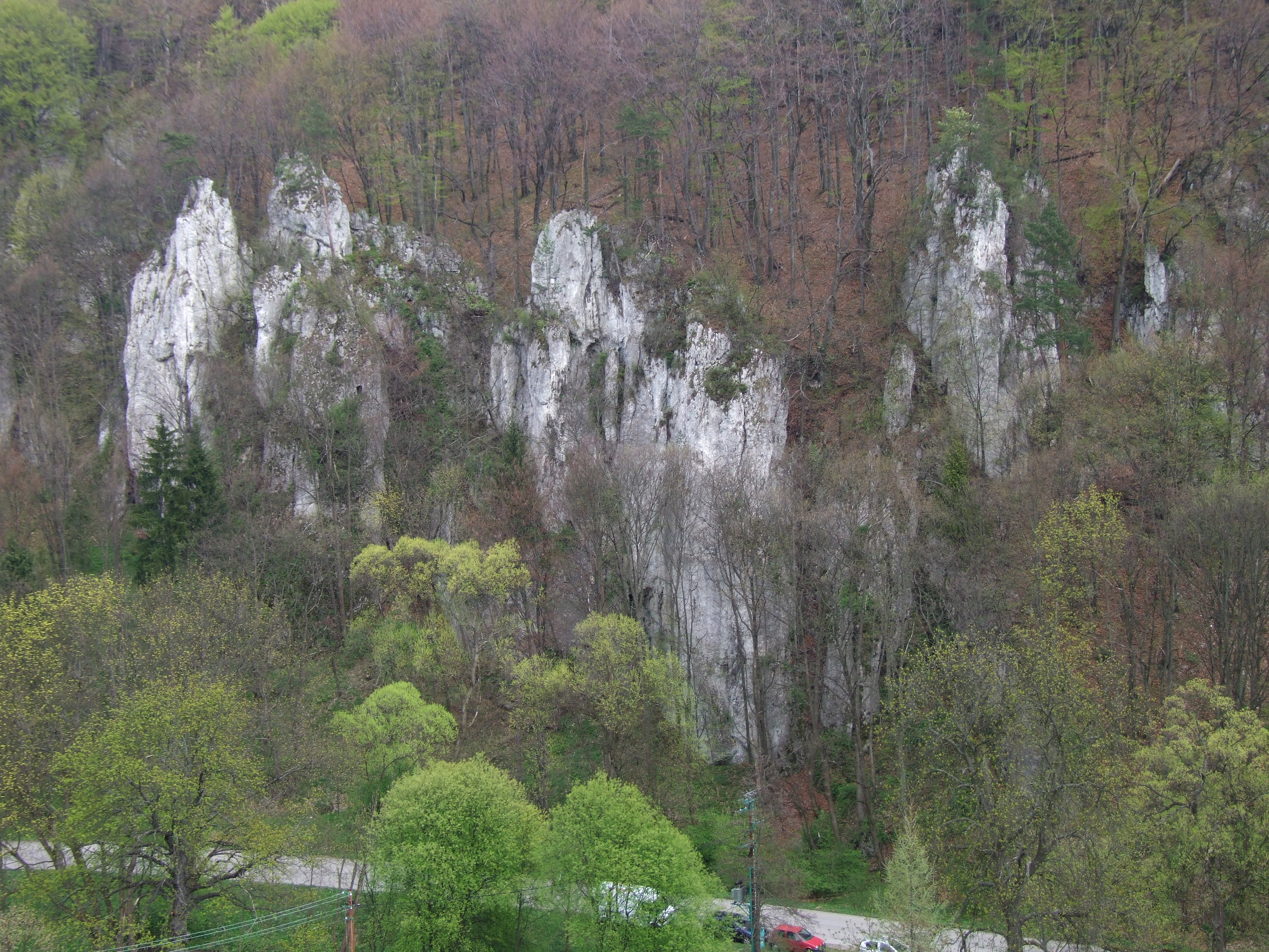 Skały Figowe w Dolinie Prądnika (Ojcowski Park Narodowy)